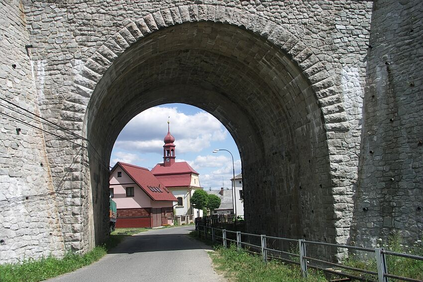 Svor (Röhrsdorf), Czech Republic